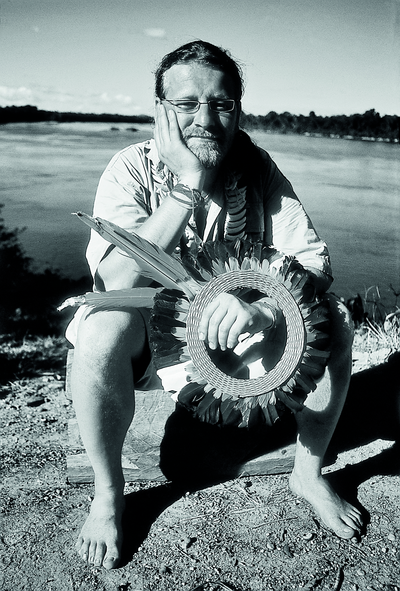 spisovatel Josef Formanek